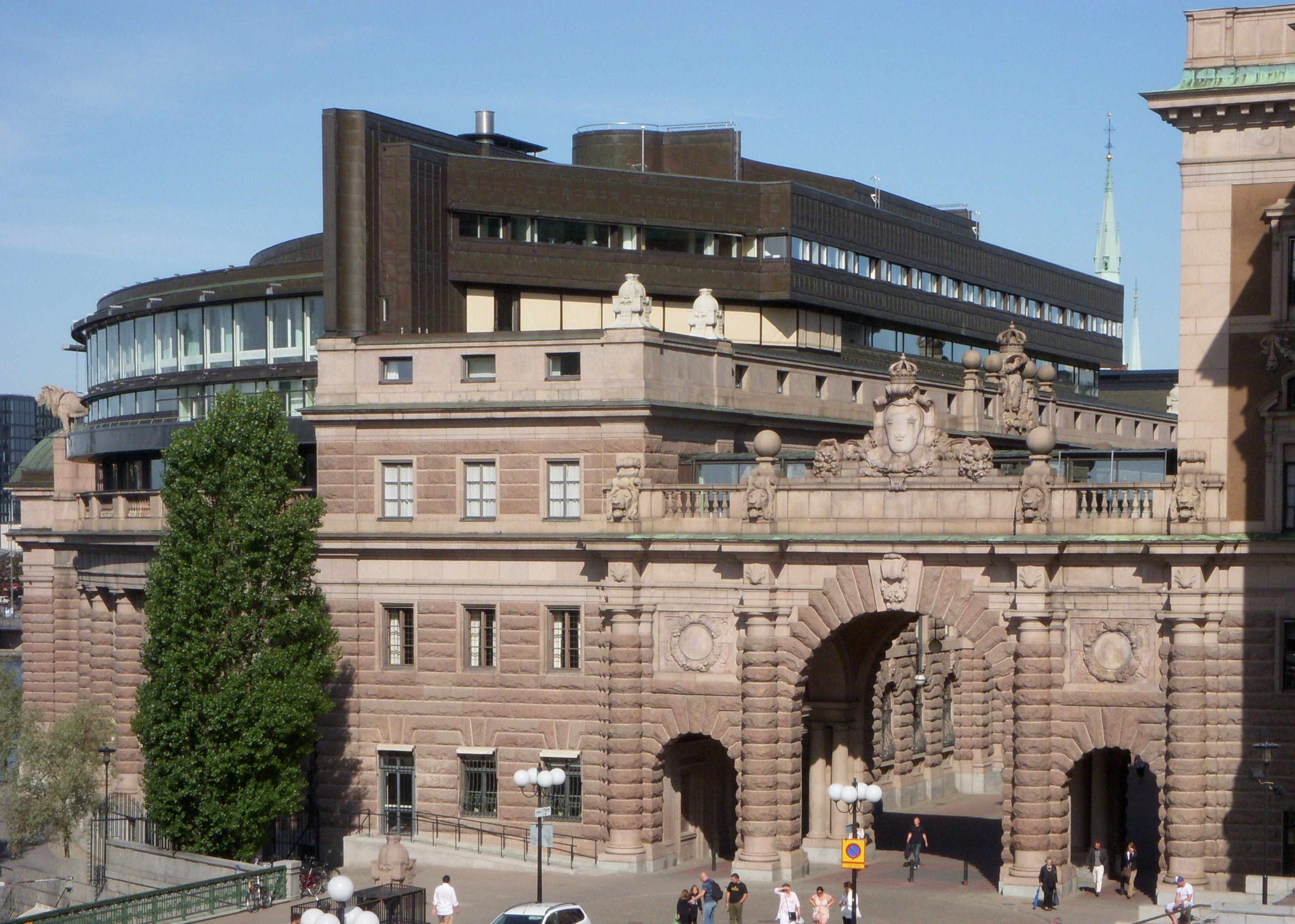 Gamla Riksbanken med påbyggnaden för Riksdagen